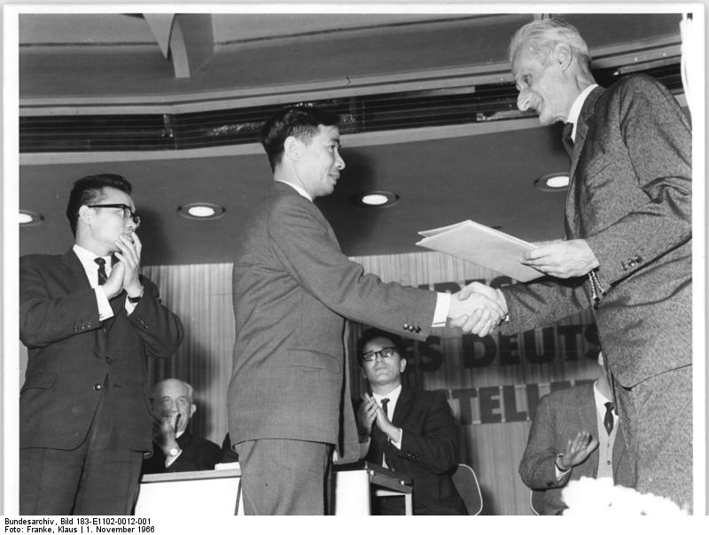 Zentralbild Franke 2.11.1966 Berlin: Kurt Stern übergibt Solidaritätsspende des Schriftstellerverbandes für Vietnam 2006 Fahrräder - diesen Wert erreichten bisher die Spenden bei der Solidaritätsaktion des Deutschen Schriftstellerverbandes, die der Vorsitzende des Vietnam-Komitees des DSV, Kurt Stern (r.), am 1.11.1966 dem 2. Sekretär der vietnamesischen Botschaft, Nguyen van Nhan (mitte, links der Dolmetscher) übergab. Die Schriftstellerlesung "Meine liebste Seite" am Vorabend der Jahreskonferenz des Schriftstellerverbandes in der Kongreßhalle am Berliner Alexanderplatz bildete den Höhepunkt und Abschluß der ersten Solidaritätsaktion "1000 Fahrräder für Vietnam" der DDR-Schriftsteller und ihrer Leser.